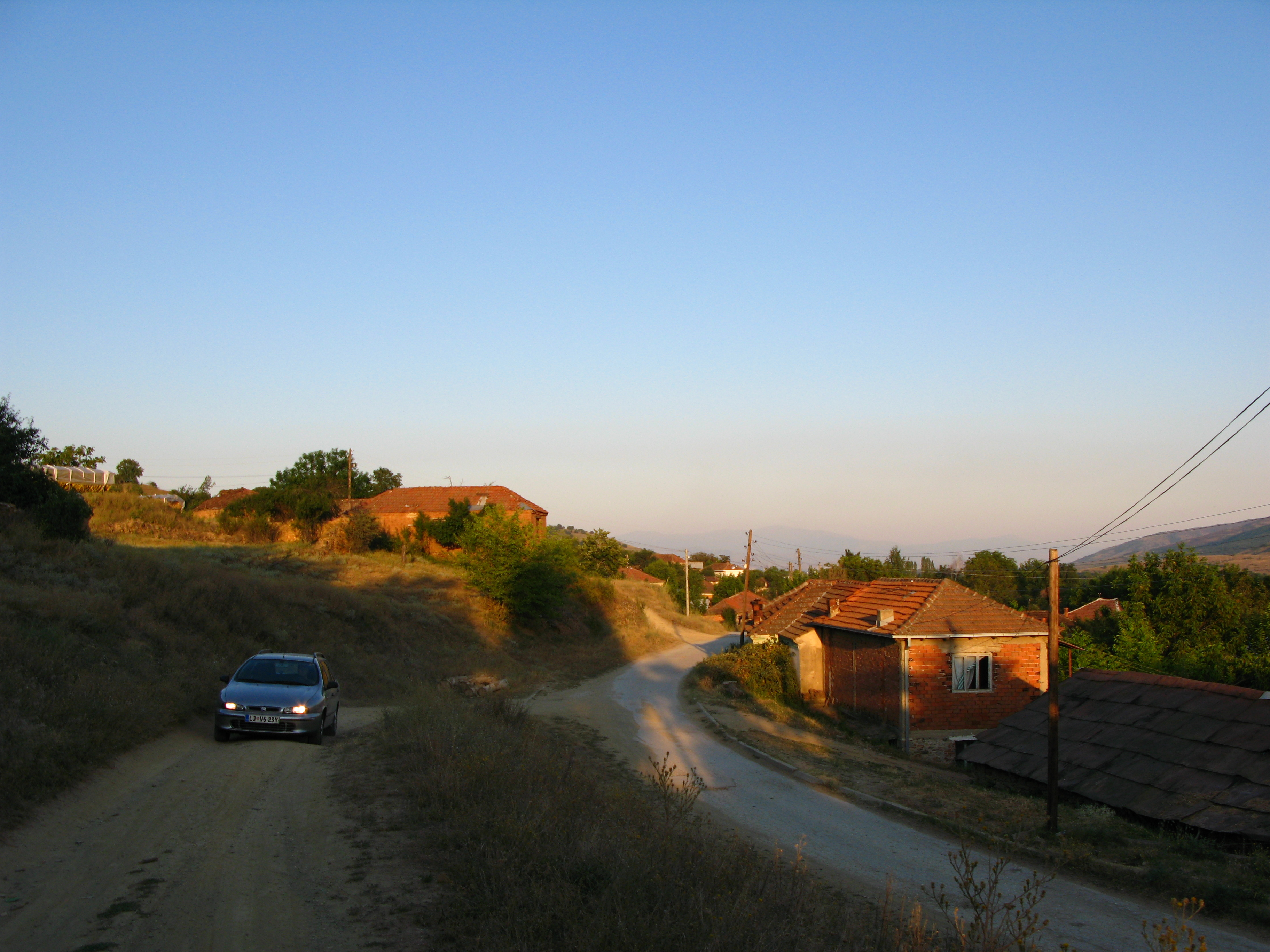 Црновец, битолско.